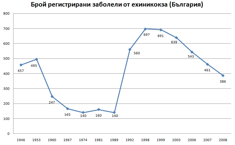 Обощена статистика на регистрирани заболели 1952-2008